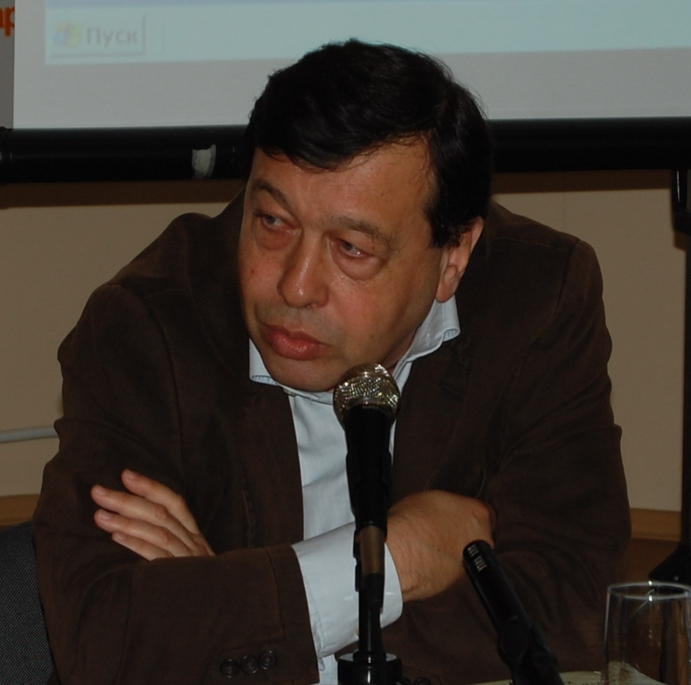 Евгений Шлемович Гонтмахер — советский, российский экономист.